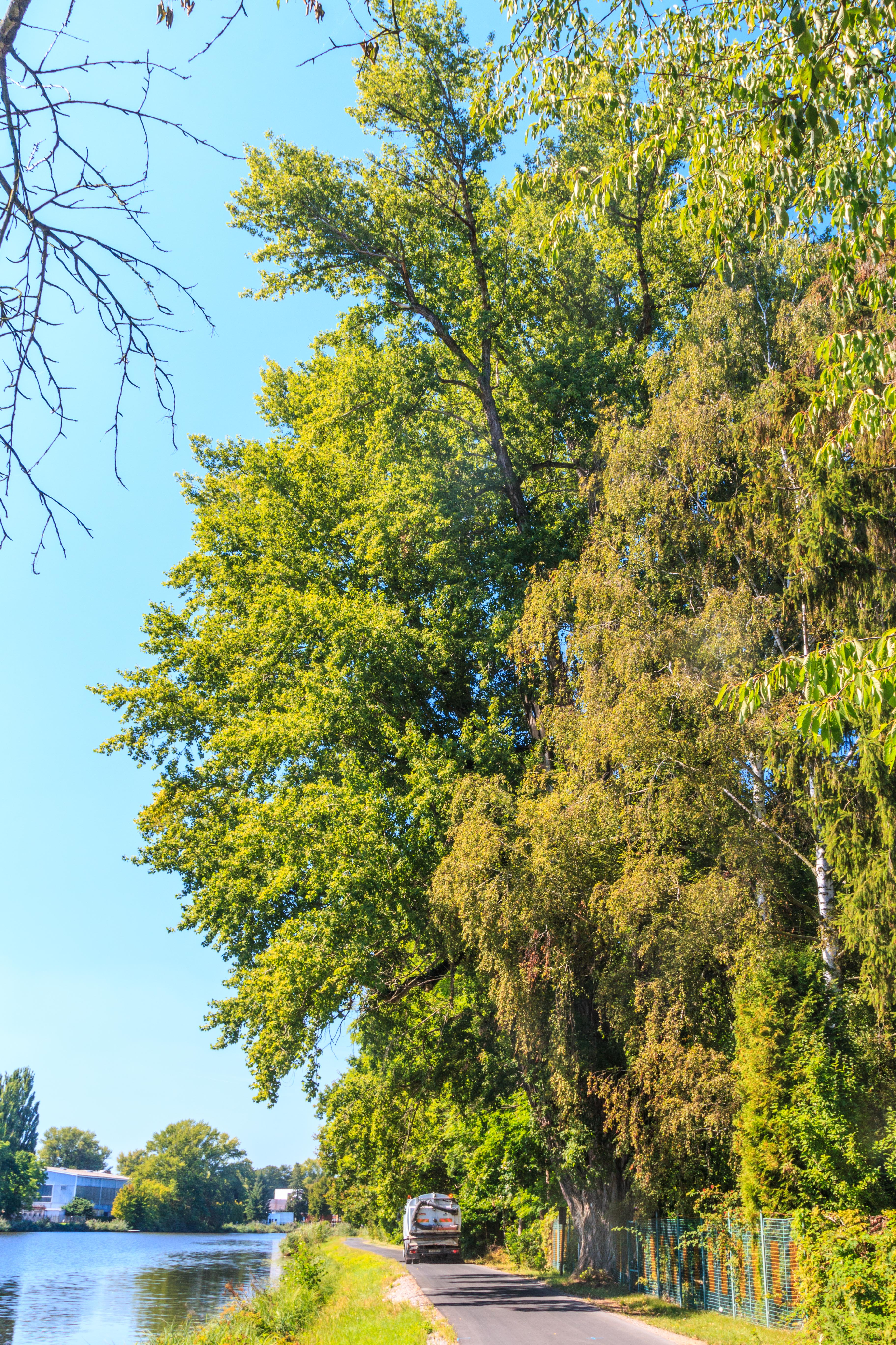 Památný topol černý u Nymburka